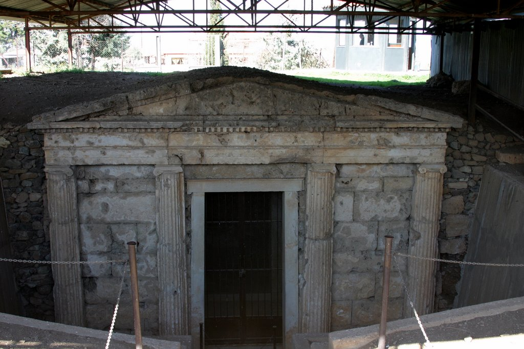 Vergina, Greece